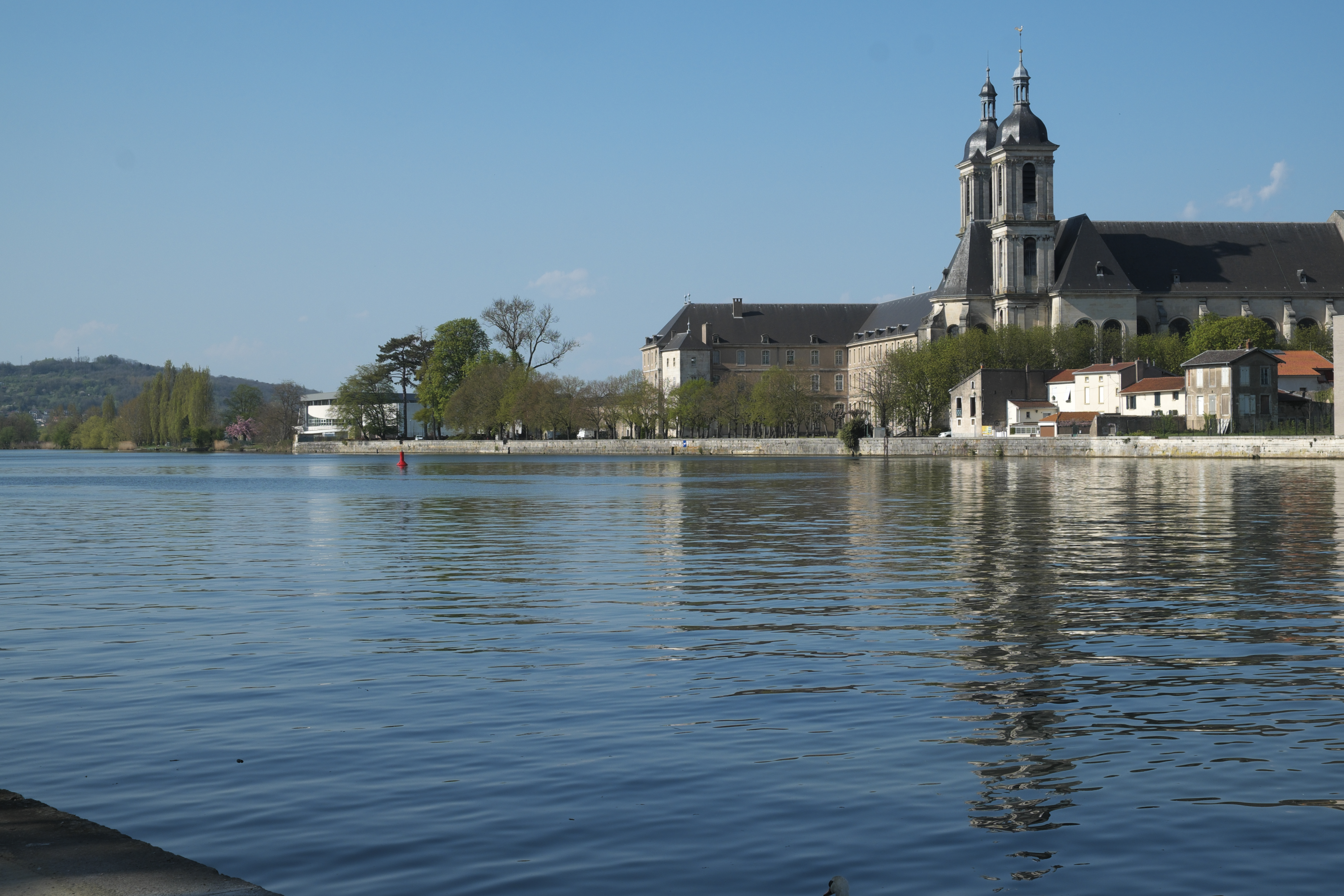 Ehemalige Prämonstratenserabtei in Pont-à-Mousson im Département Meurthe-et-Moselle (Region Grand Est/Frankreich), im Vordergrund die Mosel